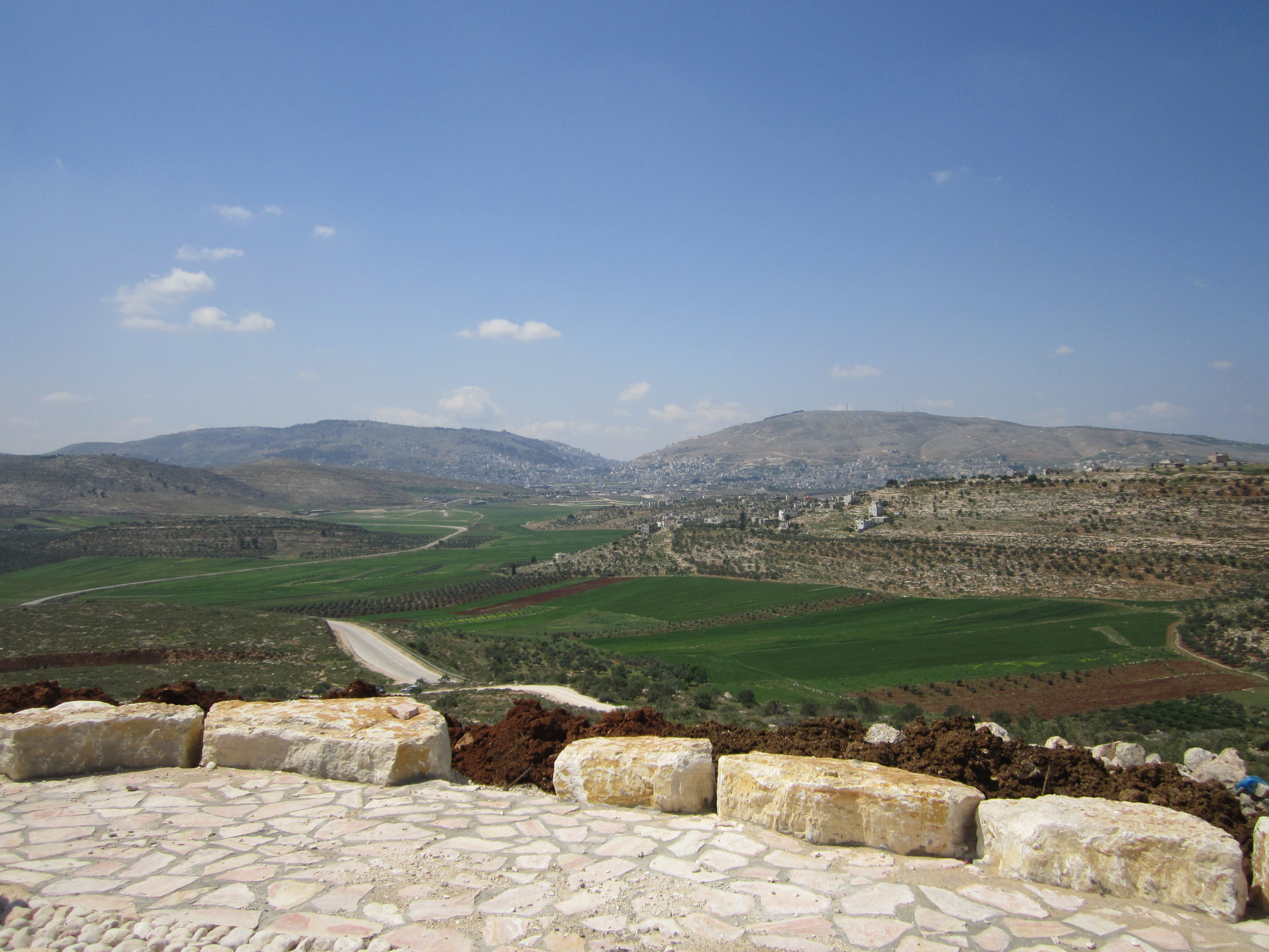 מצפה ע"ש בניו לבנת, סמוך לאלון מורה. בתמונה נראים: הר עיבל (מימין); והר גריזים (משמאל); ובתווך עיר הקודש שכם תובב"א